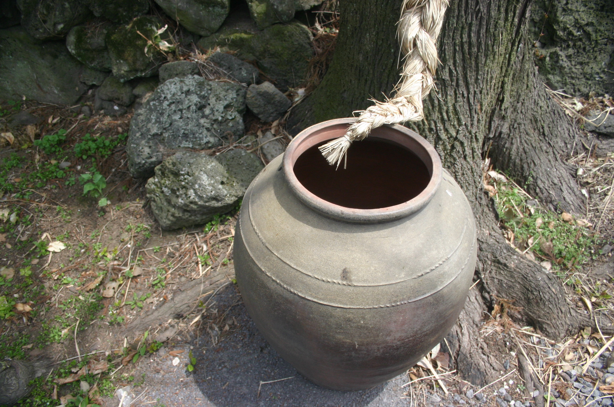 Onggi